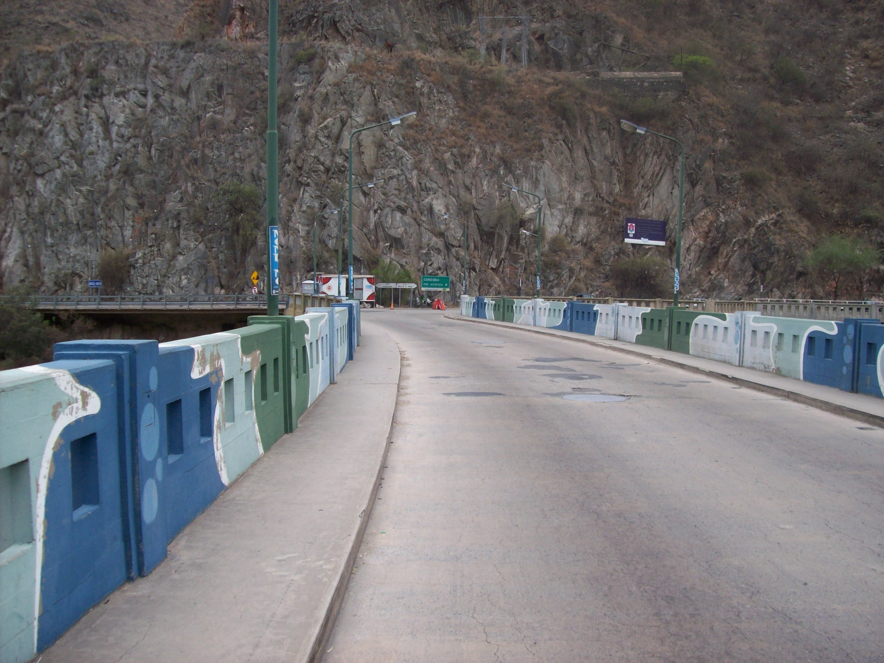 Calzada sobre la coronación del Dique San Roque en la Provincia de Córdoba, Argentina.